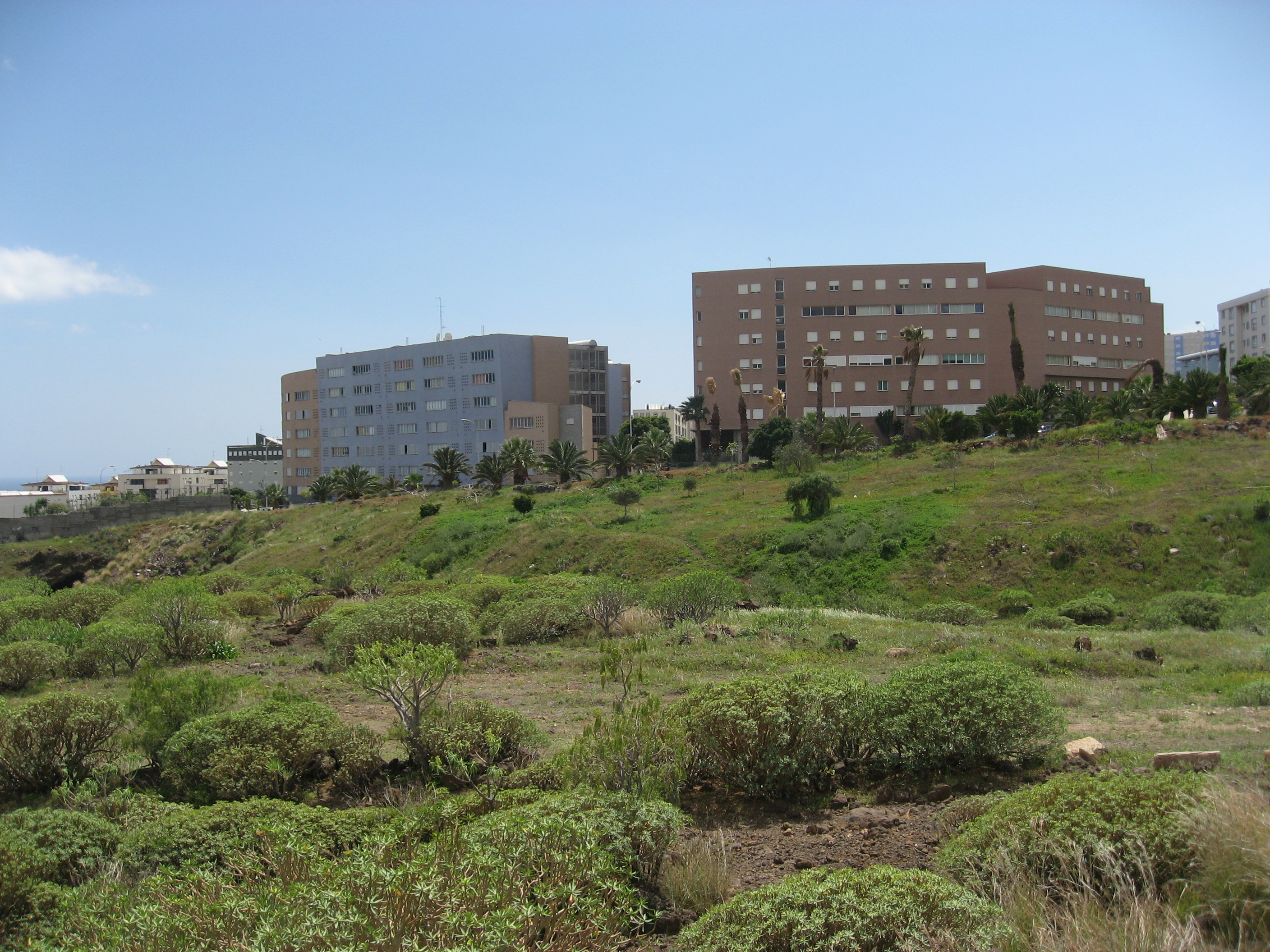 Vista de Añaza